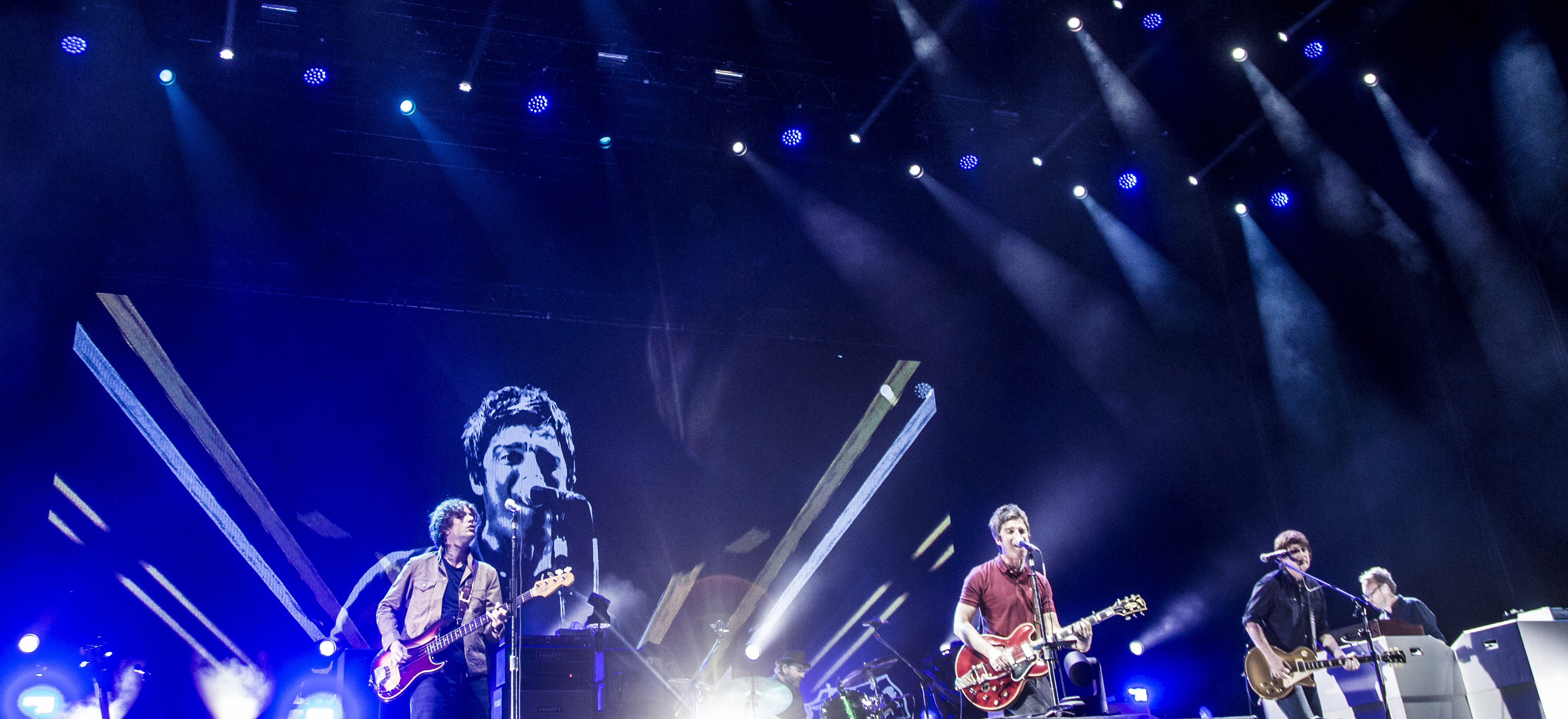 FIB 2015